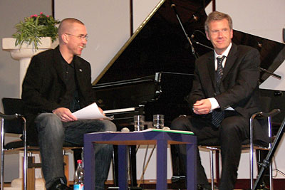 Die Weiße Runde im Kaiser-Wilhelm- und Ratsgymnasium Hannover. Matthias Horndasch im Gespräch mit Christian Wulff.